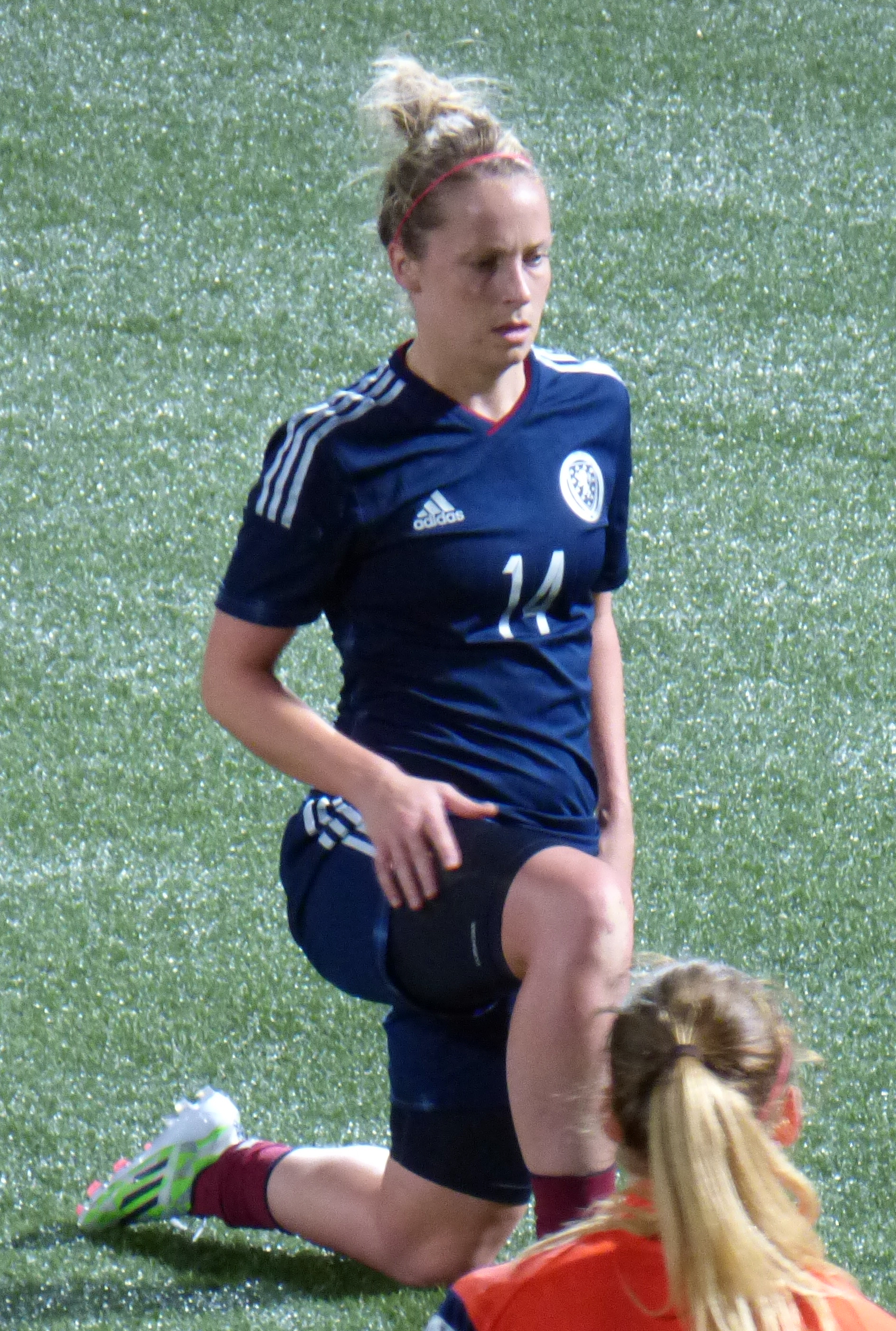 Match amicale FOOTBALL Féminin équipe de FRANCE conte l'ECOSSE 28 MAI 2015 1 à 0